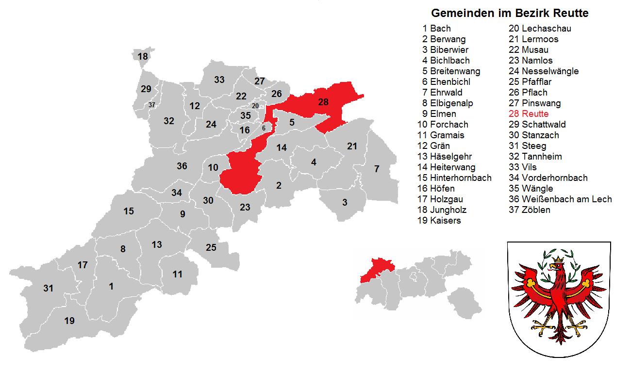 Bezirk Reutte